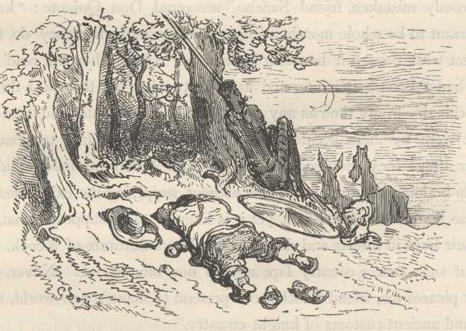 "Dom Quixote e Sancho Pança pernoitam ao relento" (1863), iIustração por Gustave Doré para “Don Quixote“ de Miguel de Cervantes.